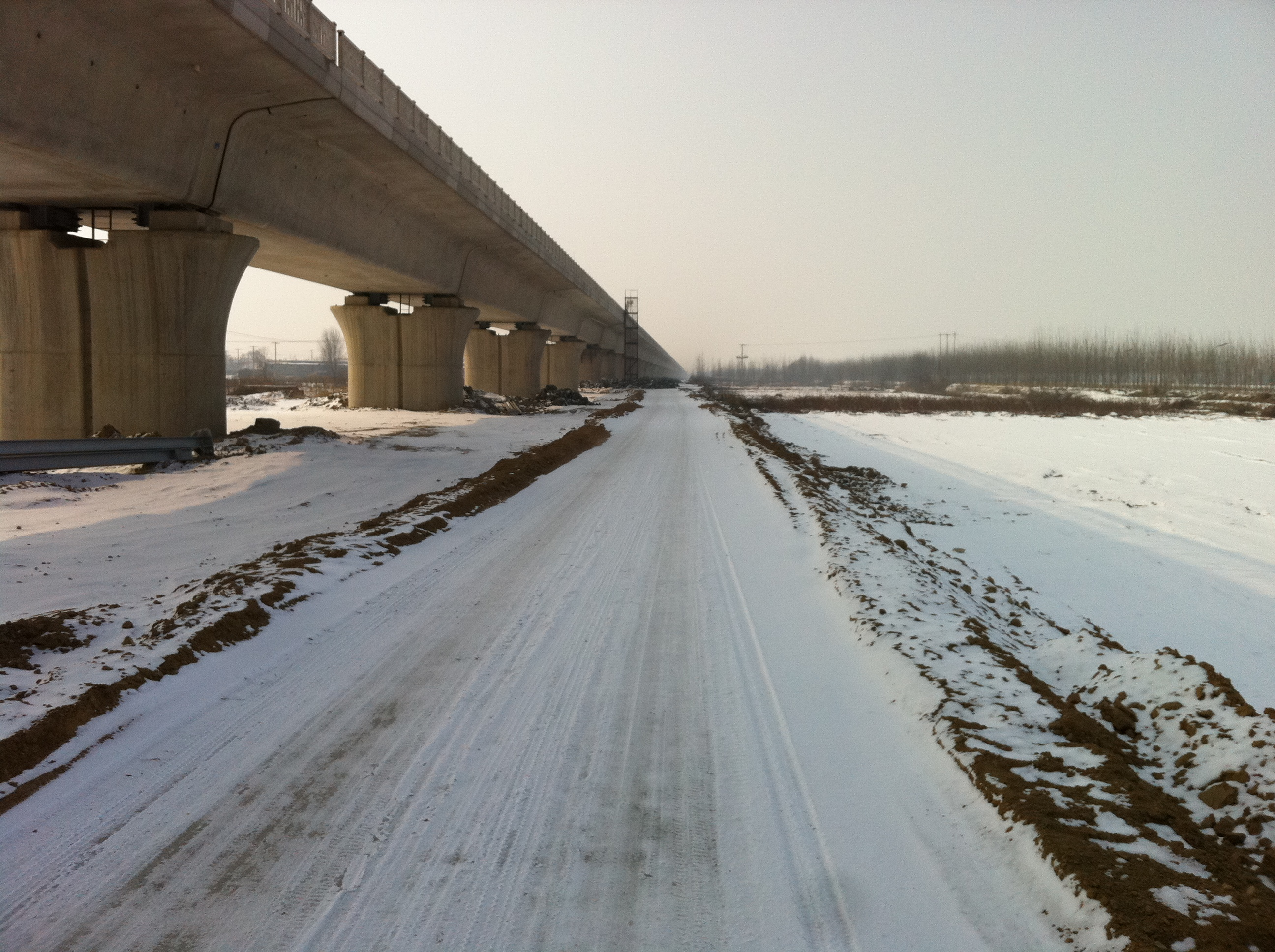 Fengnan, Tangshan, Hebei, China